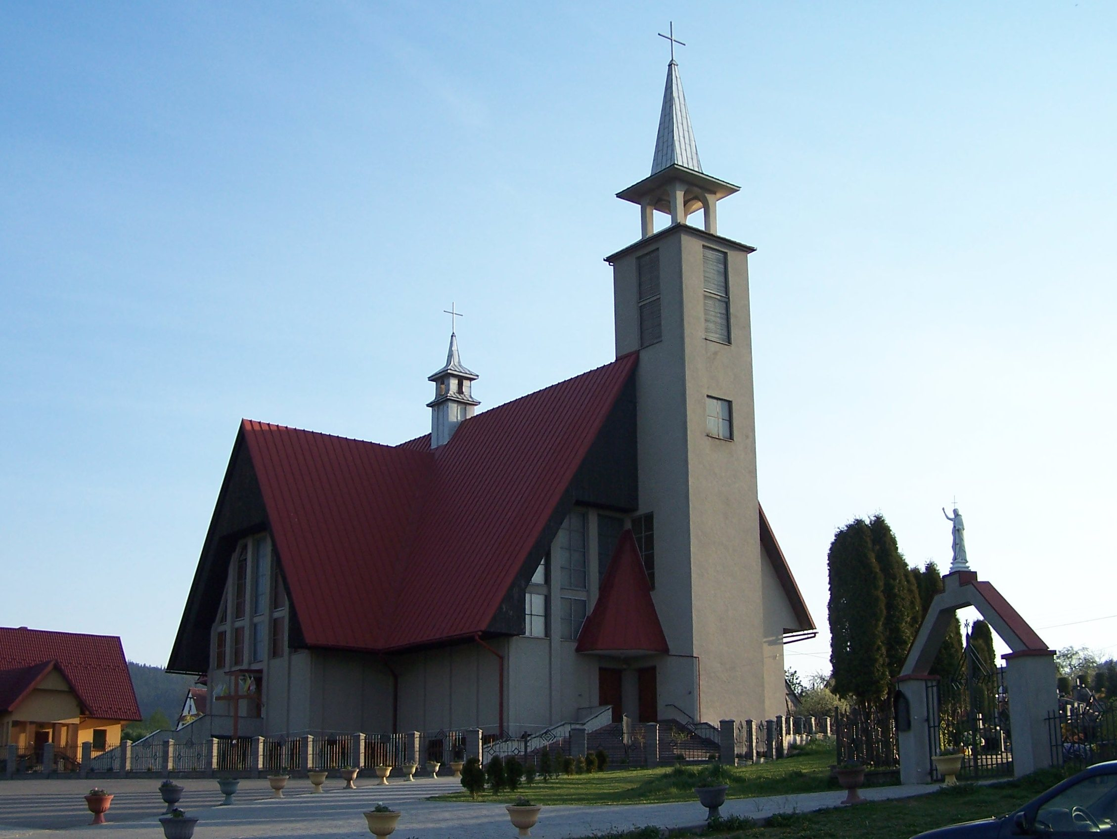 Słopnice Górne - rzymskokatolicki kościół parafialny p.w. MB Częstochowskiej, 1981-1992